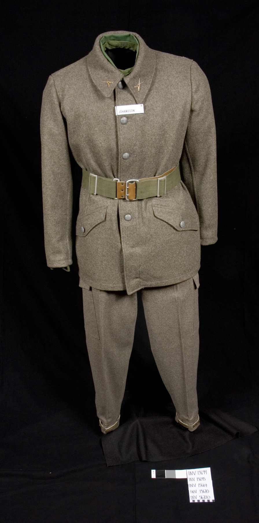 Fältuniform m/1958 Identifikationsnr: AM.015694 Samling: Armémuseum